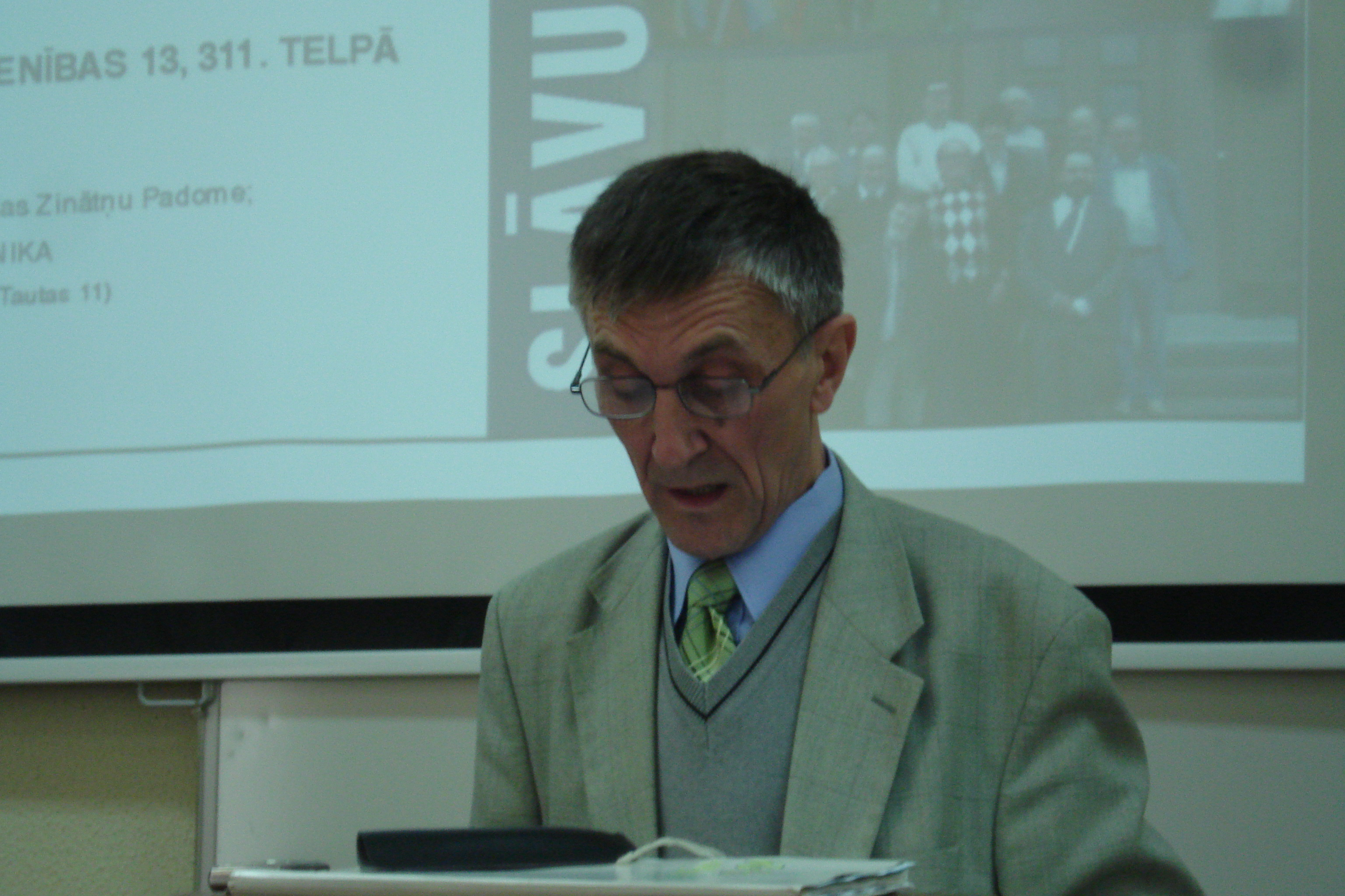 Silvestras Gaižiūnas (g. 1950) - Lietuvos kalbininkas, vertėjas, literatūrologas. Konferencija Daugpilyje 2008 geg. 20 d. Сильвестрас Гайжюнас читает доклад о Дон Жуане на Славянских чтениях в Даугавпилсе (20 мая 2009)